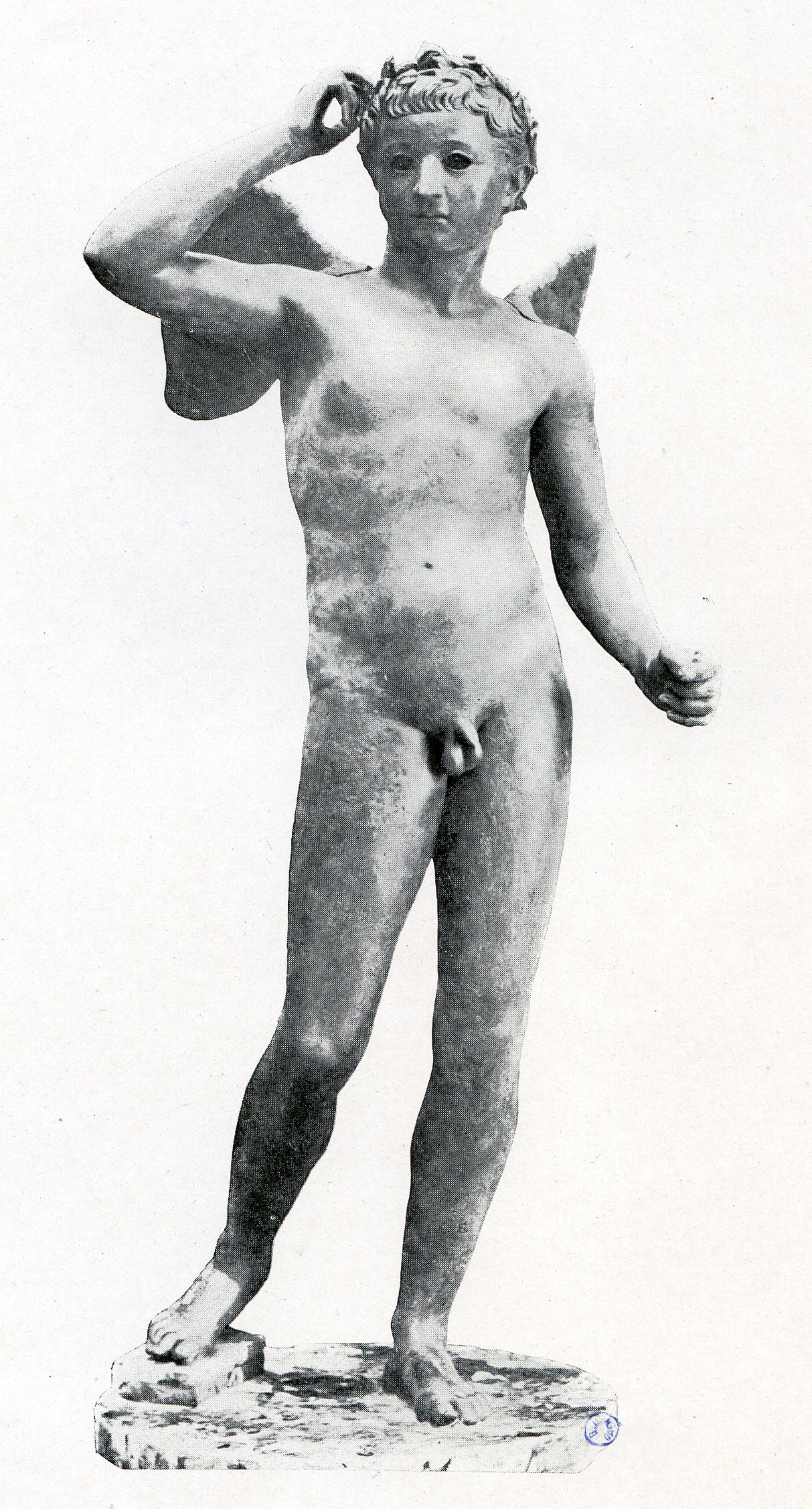 Agon retrouvé dans les fouilles du navire de Mahdia, avec le bras restauré